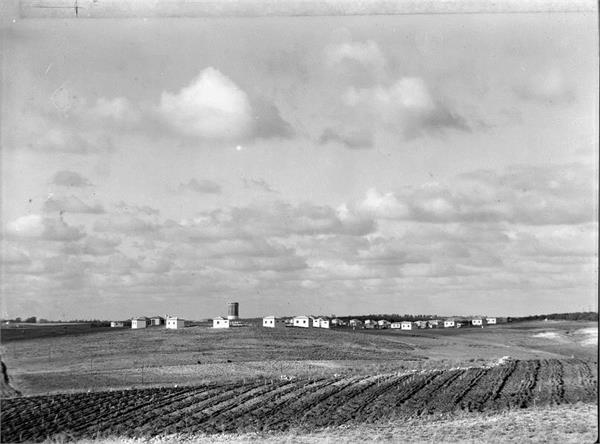 כפר מרמורק - מושב תימנים